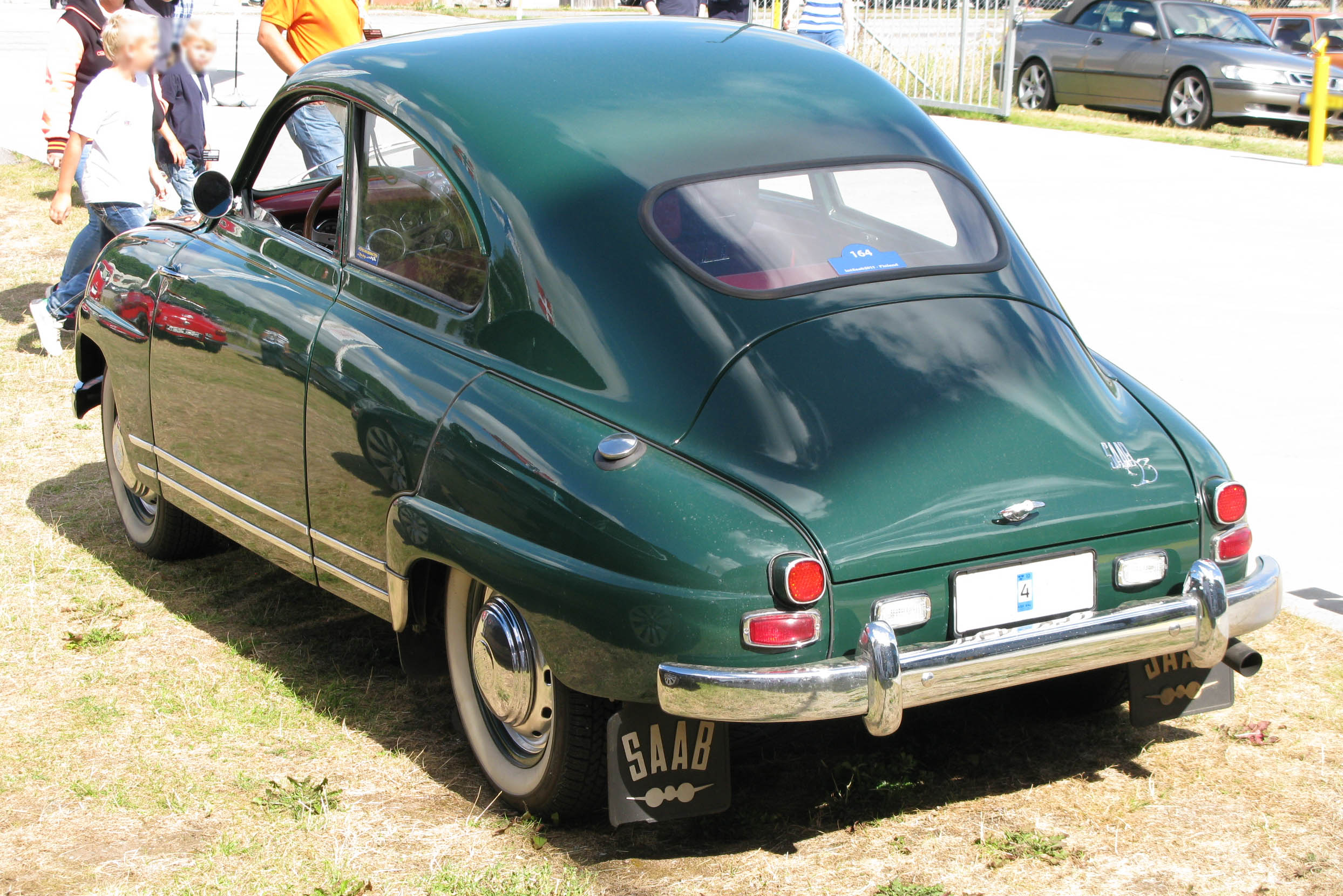 International Saab Meeting 2016.